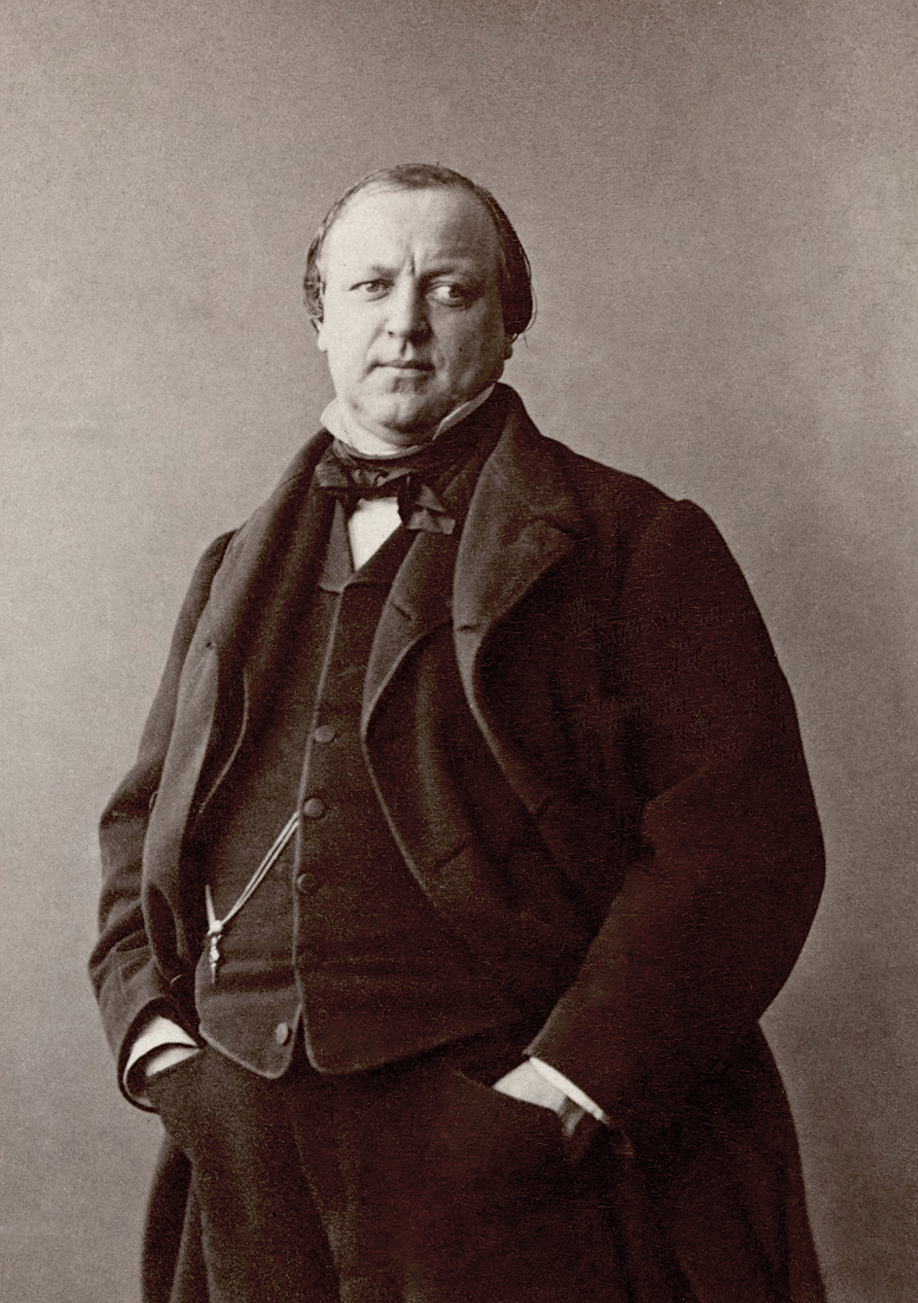 Charles Lachaud (1817 - 1882), avocat français